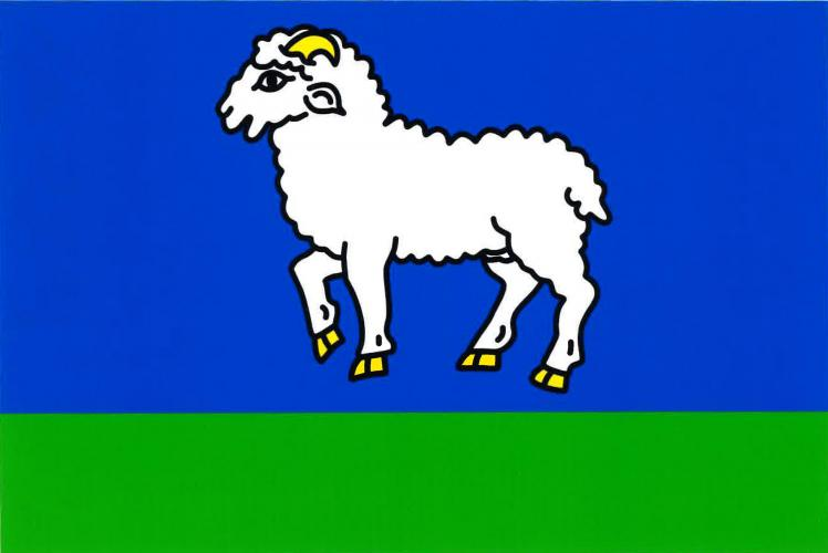 vlajka, Kratochvilka, okres Brno-venkov